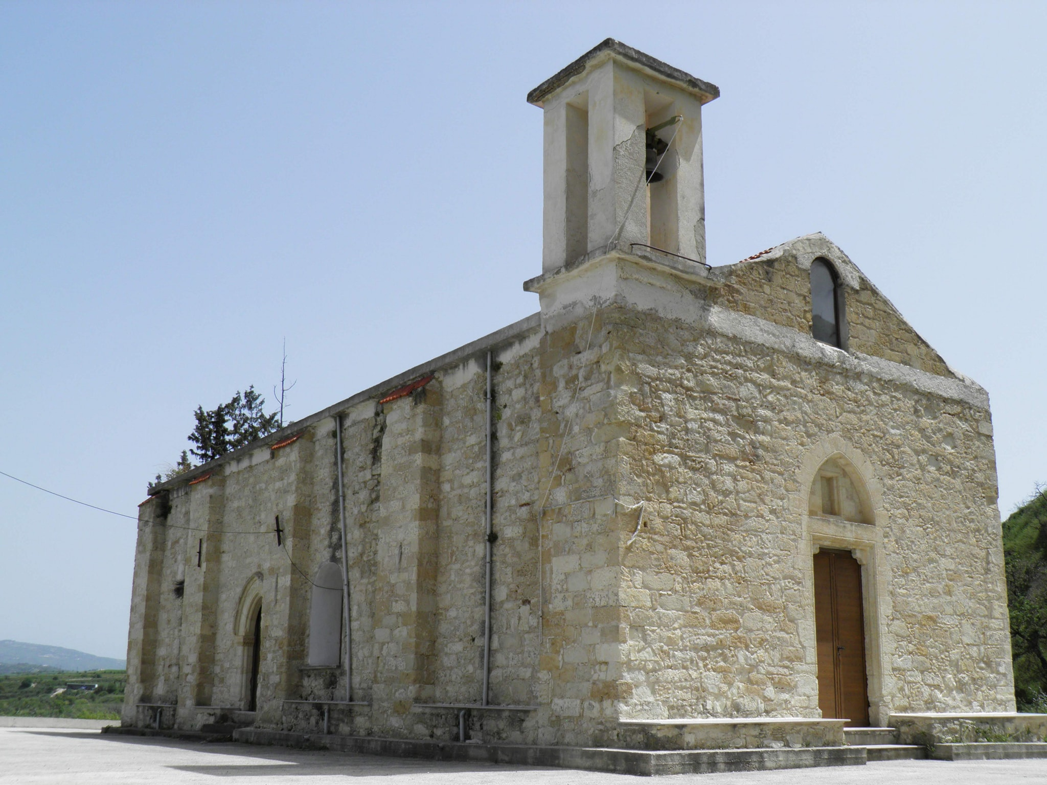 Εκκλησία παλιάς Θελέτρας- Παναγία Χρυσελεούσα